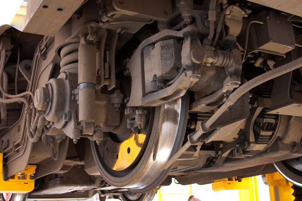 Eurobahn.